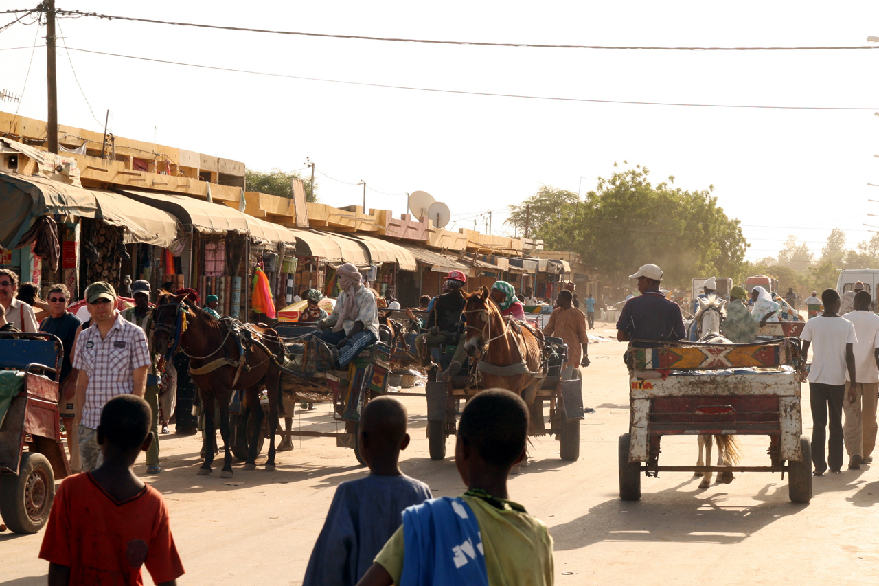 Route à Richard-Toll